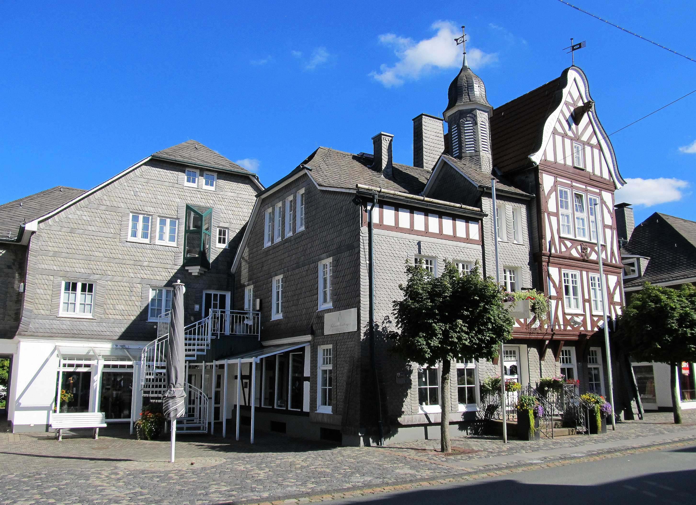 This is a photograph of an architectural monument., no. 13 Haus Schenk, Schmallenberg, Weststraße 11. Das nach dem letzten Stadtbrand errichtete Bürgerhaus wurde 1902 im Stil Sauerländer Fachwerkbauten erweitert und aufgestockt. Zu erkennen sind die Einflüsse des Jugendstils.